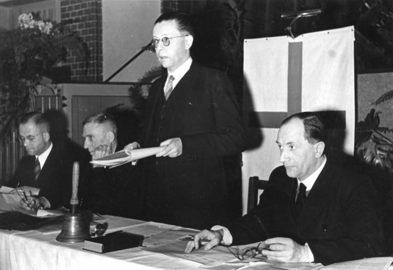 Bethel, Generalsynode, Gustav Heinemann spricht Illus-dpd Generalsynode der E.K.i.D. in Bethel In Bethel bei Bielefeld tagte vom 9. - 13.1.49 die Generalsynode der evangelischen Kirche in Deutschland (E.K.i.D.), um den Rat der evangelischen Kirche in Deutschland und seinen Präsidenten neu zu wählen. Der bisherige Präsident, Landesbischof D. Wurm, ist wegen seines hohen Alters zurückgetreten. Der Präsident der Generalsynode ist der Essener Oberbürgermeister Dr. Dr. Heinemann. Unser Bild zeigt Dr. Dr. Heinemann als Präsident der Generalsynode bei einer Ansprache. V.l.n.r.: Oberkirchenrat Dr. Merzyn (Kirchenkanzlei Schwäbisch-Gmünd) - Staatsrat Dr. Meinsolt (Präsident der Bayrischen Landessynode München) - Präsident Dr. Dr. [Gustav] Heinemann (Oberbürgermeister von Essen) und Propst Dr. Böhm. 11-1-49 2668-49 Abgebildete Personen: Heinemann, Gustav Dr. Dr.: Bundespräsident, Bundesminister für Justiz, SPD, Bundesrepublik Deutschland